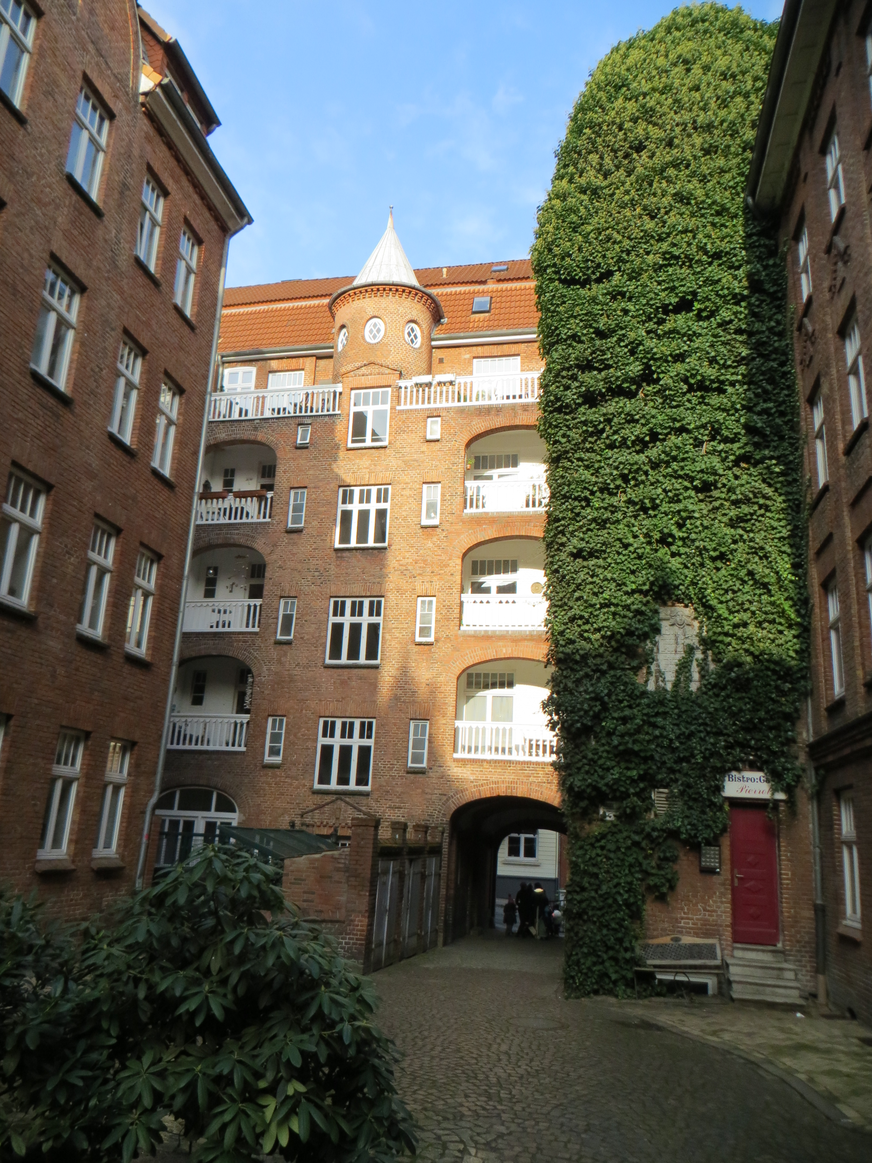 Burghof, Flensburg, Innenhof, Blick nach Norden, Bild 04